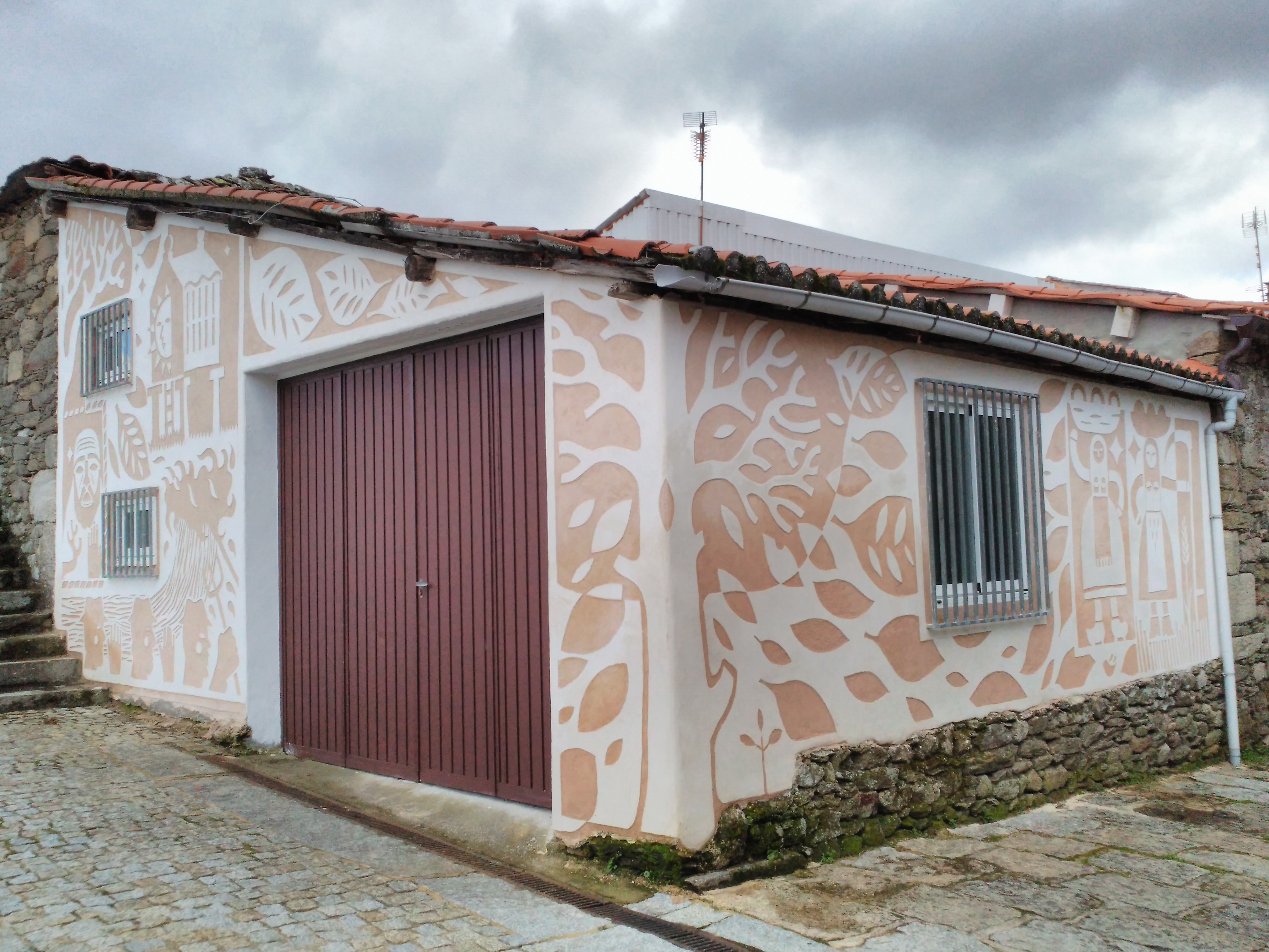 Muralismo contemporáneo de Cestola na Cachola empregando a técnica do esgrafiado en Praza da Torre (Castro Caldelas, provincia de Ourense)